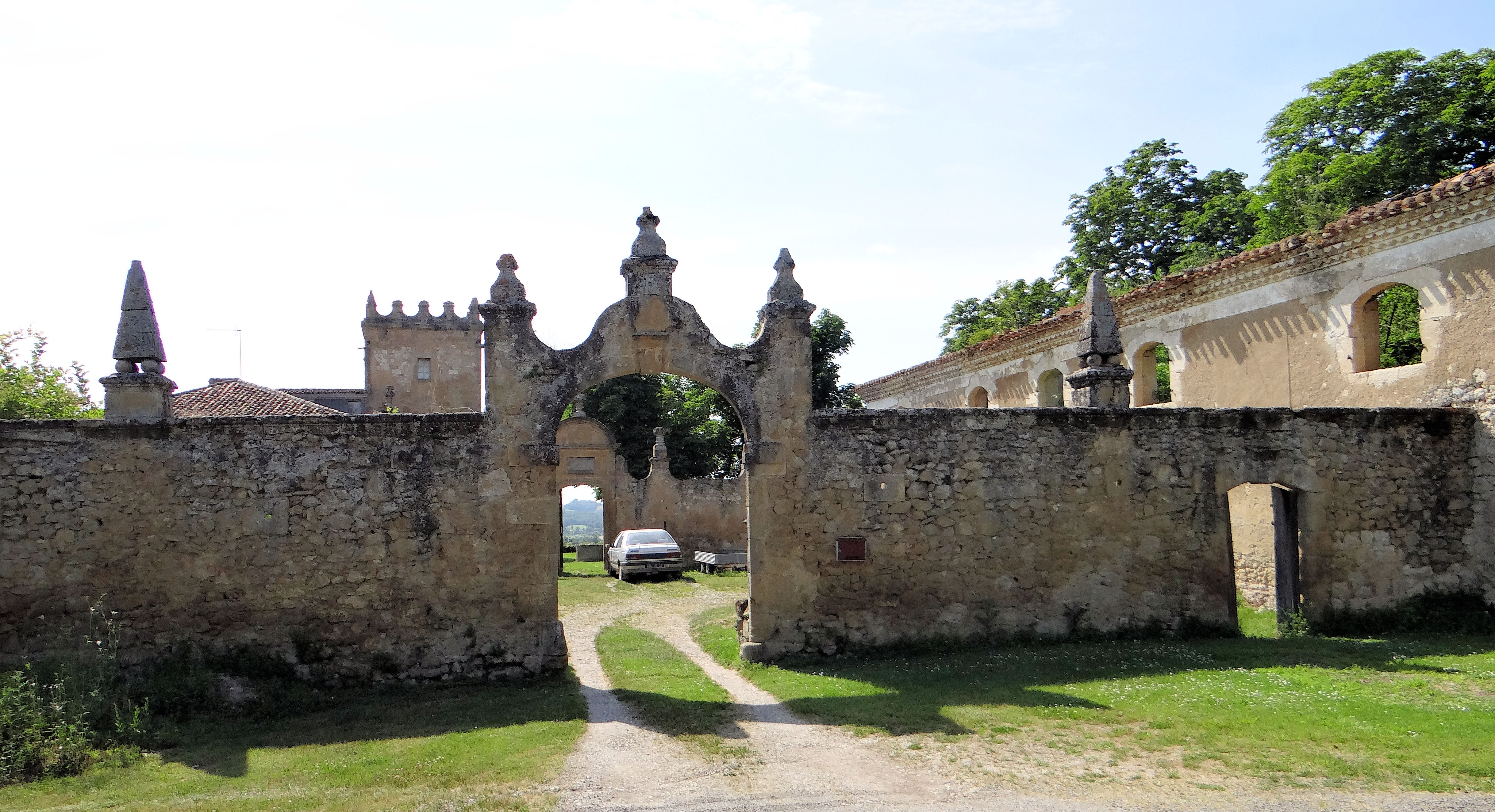 Faget-Abbatial - Logis abbatial - Première enceinte donnant accès à la basse-cour